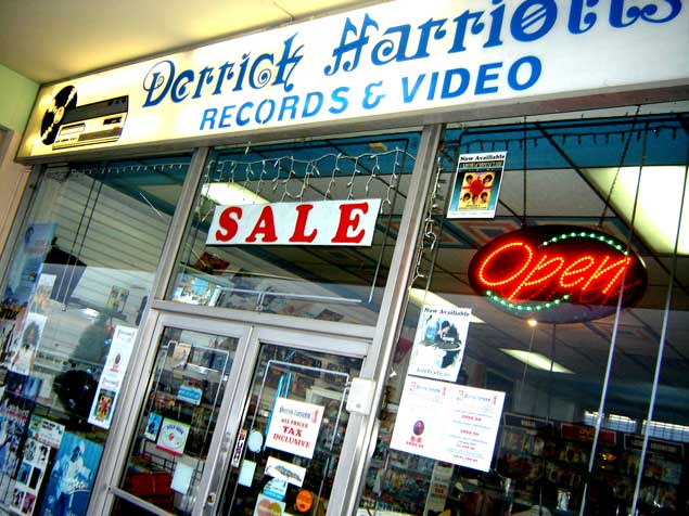 Derrick Harriot´s. Foto: Dubdem e FabDub.